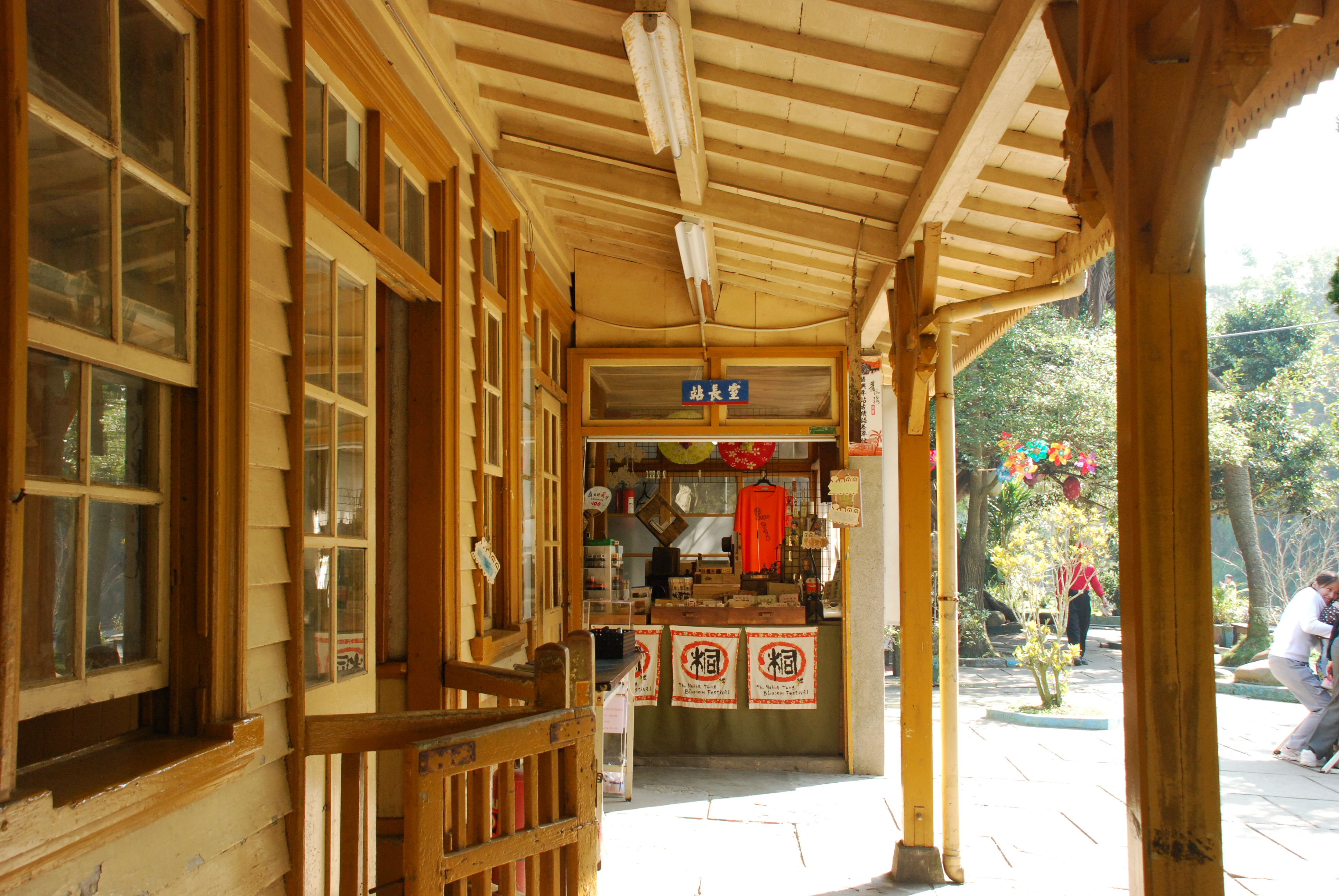 367, Taiwan, 苗栗縣三義鄉勝興村